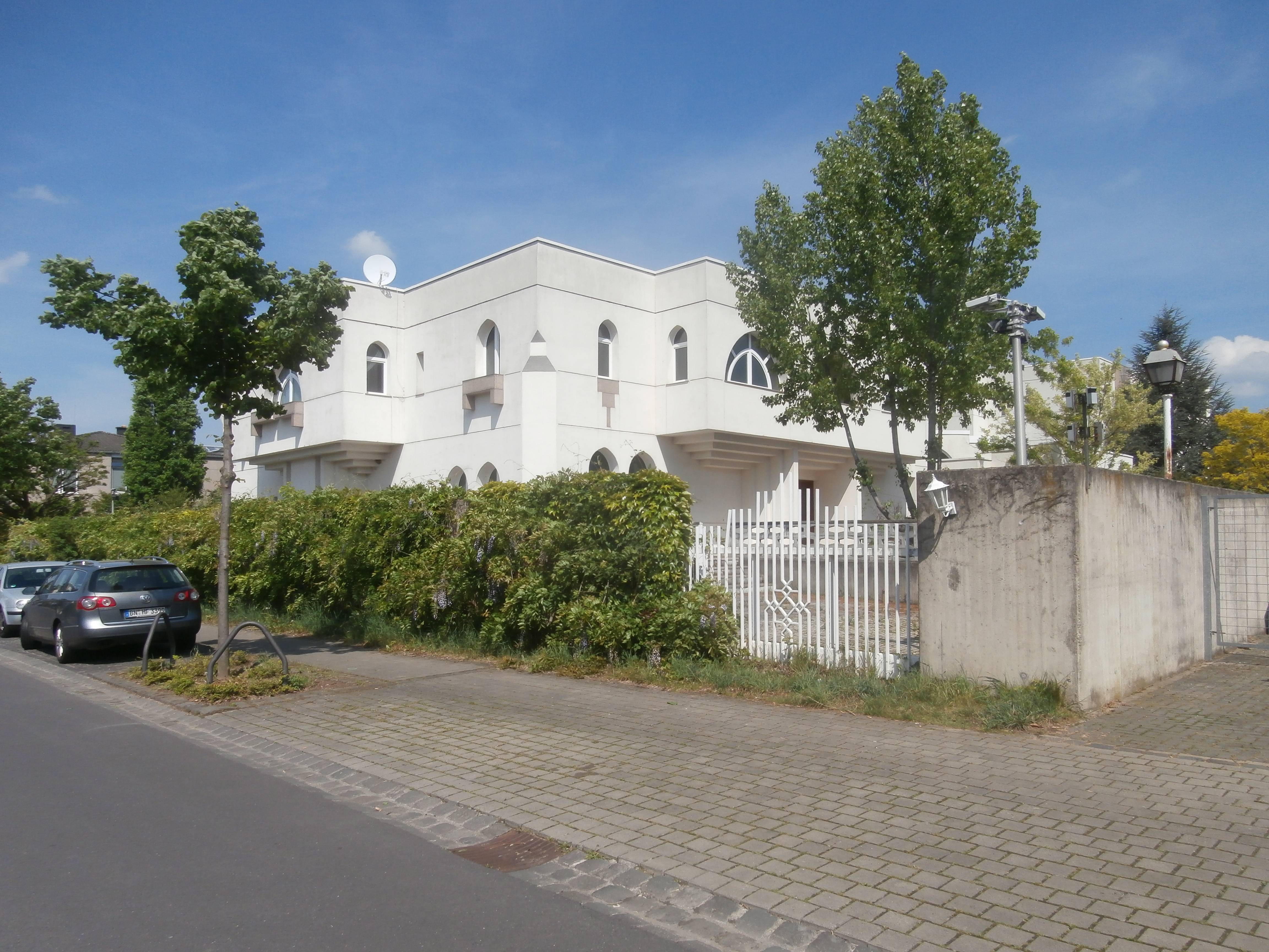 Ehemalige Botschaft der Arabischen Republik Syrien, Andreas-Hermes-Straße 5, Bad Godesberg: Ansicht des Residenzgebäudes von der Ferdinand-Lassale-Straße